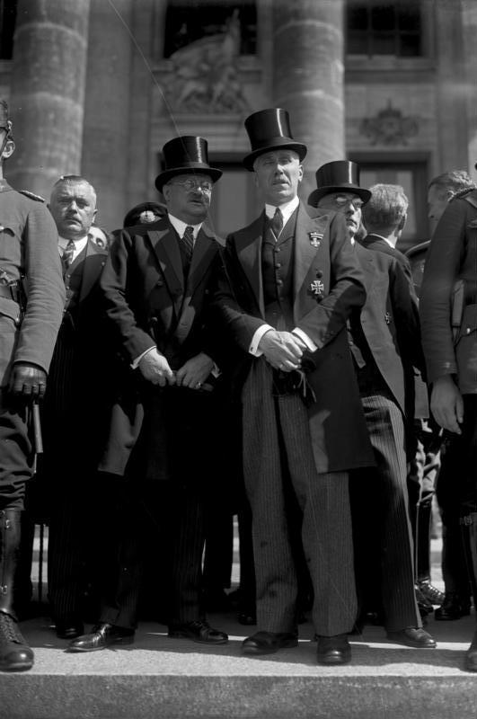 Die grosse Verfassungsfeier der Reichsregierung am 11. August 1932 in Berlin! Reichskanzler von Papen und Staatssekretär Dr. Meissner dahinter links Reichsernährungsminister von Braun und rechts Reichinnenminister Freiherr von Gayl, auf der grossen Freitreppe des Reichstags nach der Verfassungsfeier.